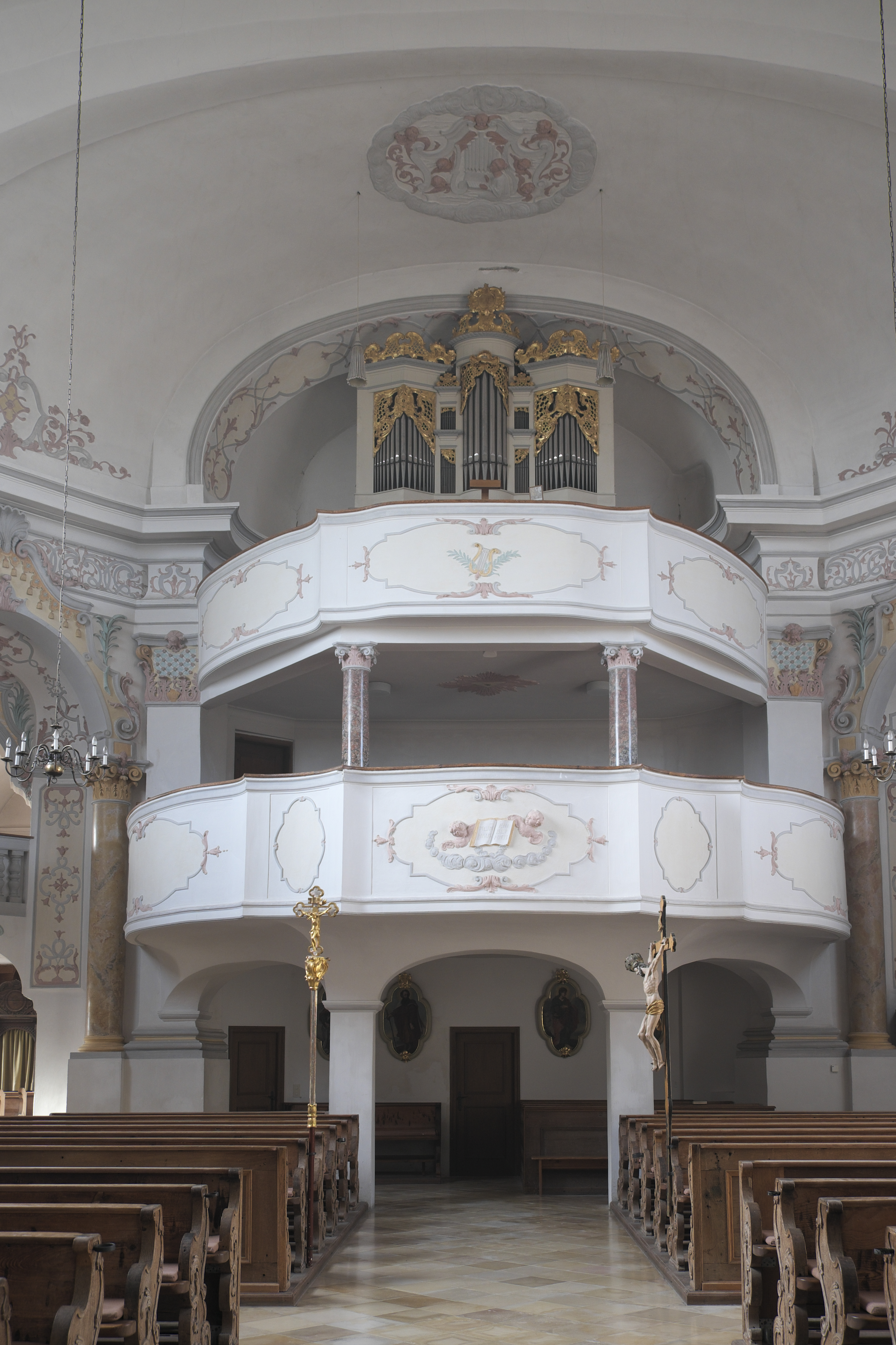 Katholische Pfarrkirche St. Johannes Baptist in Bergkirchen im Landkreis Dachau (Bayern/Deutschland), Empore